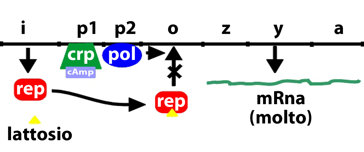 Immagine di Danilo Giacomelli